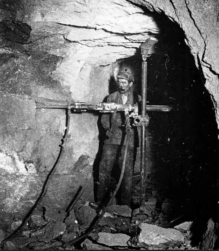 Lasse i Hagen med pneumatisk pelarborr i Skottvångs gruva